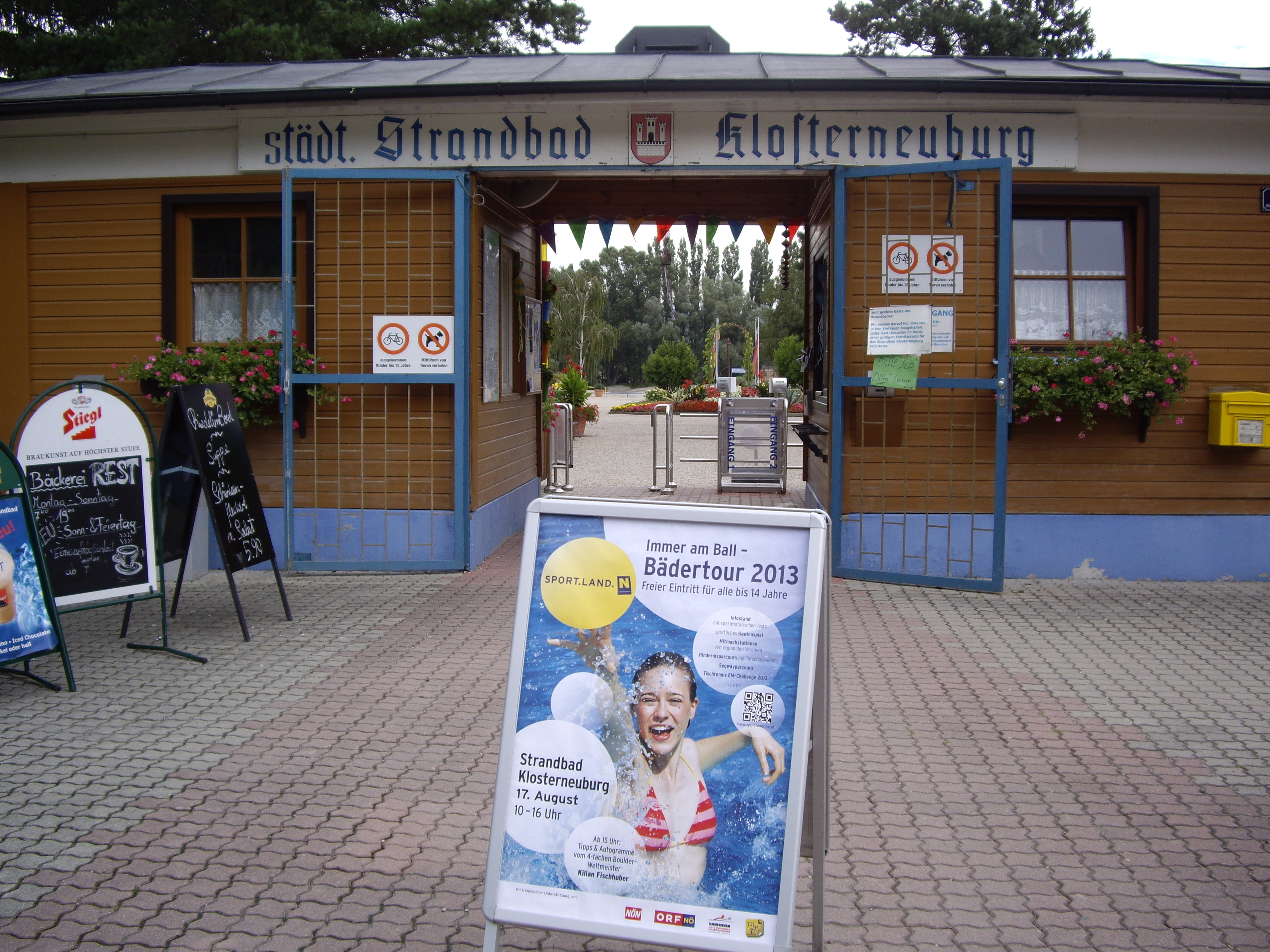 La ĉefenirejo de la strandbanejo Klostronovburgo Deitsch: Der Haupteingang vom Strandbad Klosterneuburg